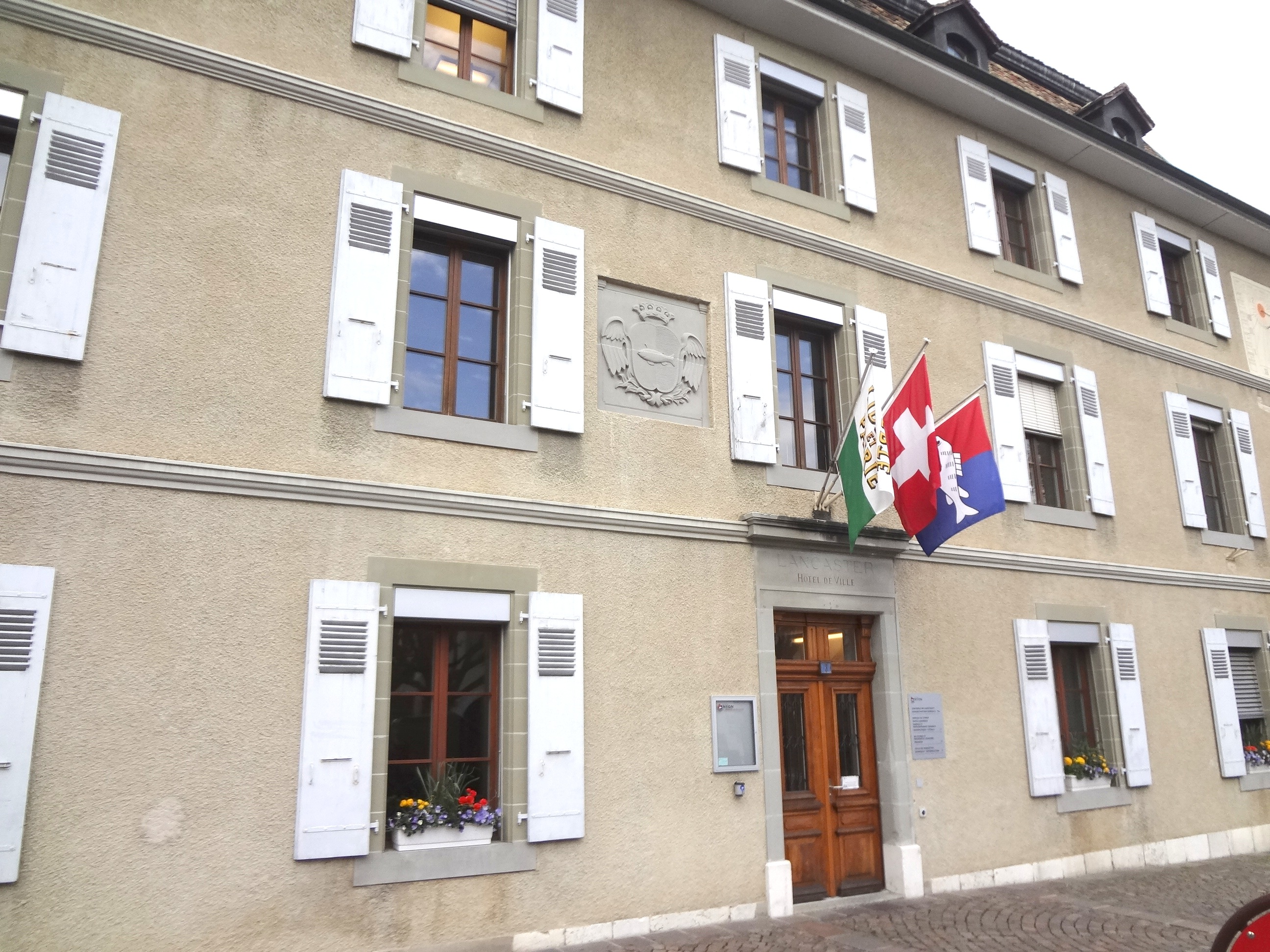 Mairie de Nyon. Ancienne "Ecole Lancaster".